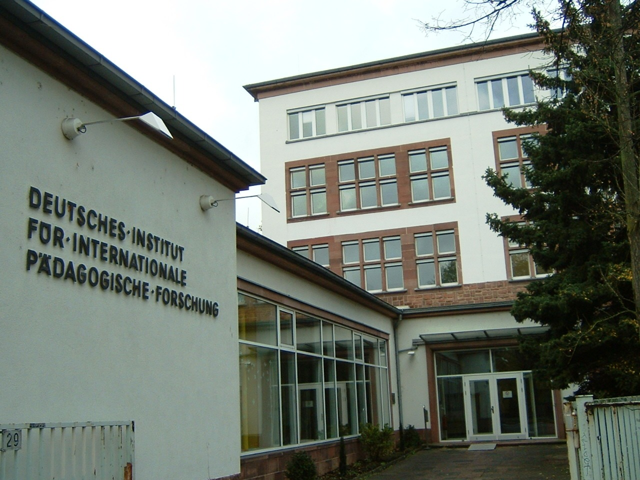 Deutsches Institut für Internationale Pädagogische Forschung, Eingang, Schloßstraße, Frankfurt-Bockenheim. Vor dem Zweiten Weltkrieg Kaufunger- und Kurfürstenschule (Doppel-Schulbau).